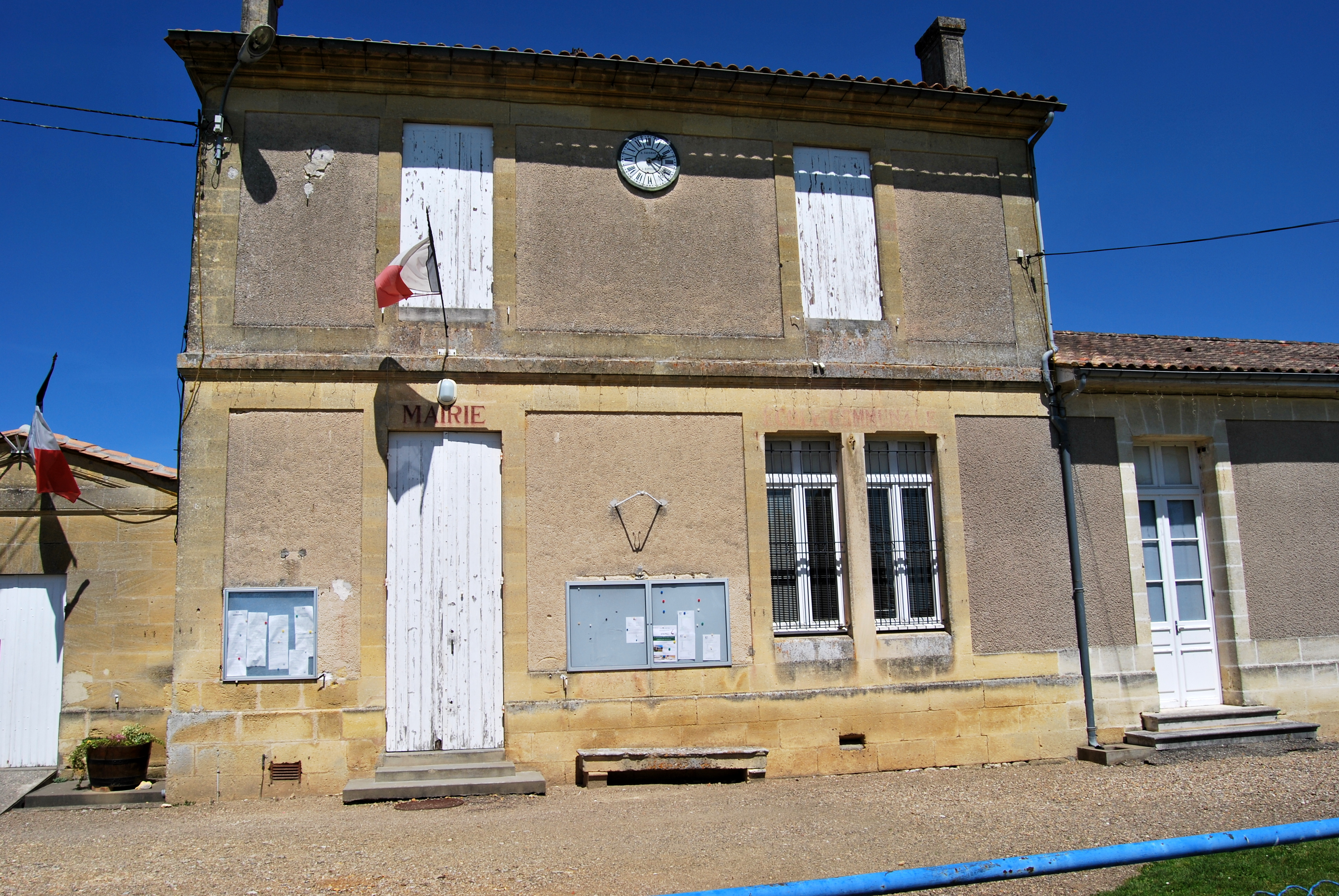 Tizac-de-Curton Mairie